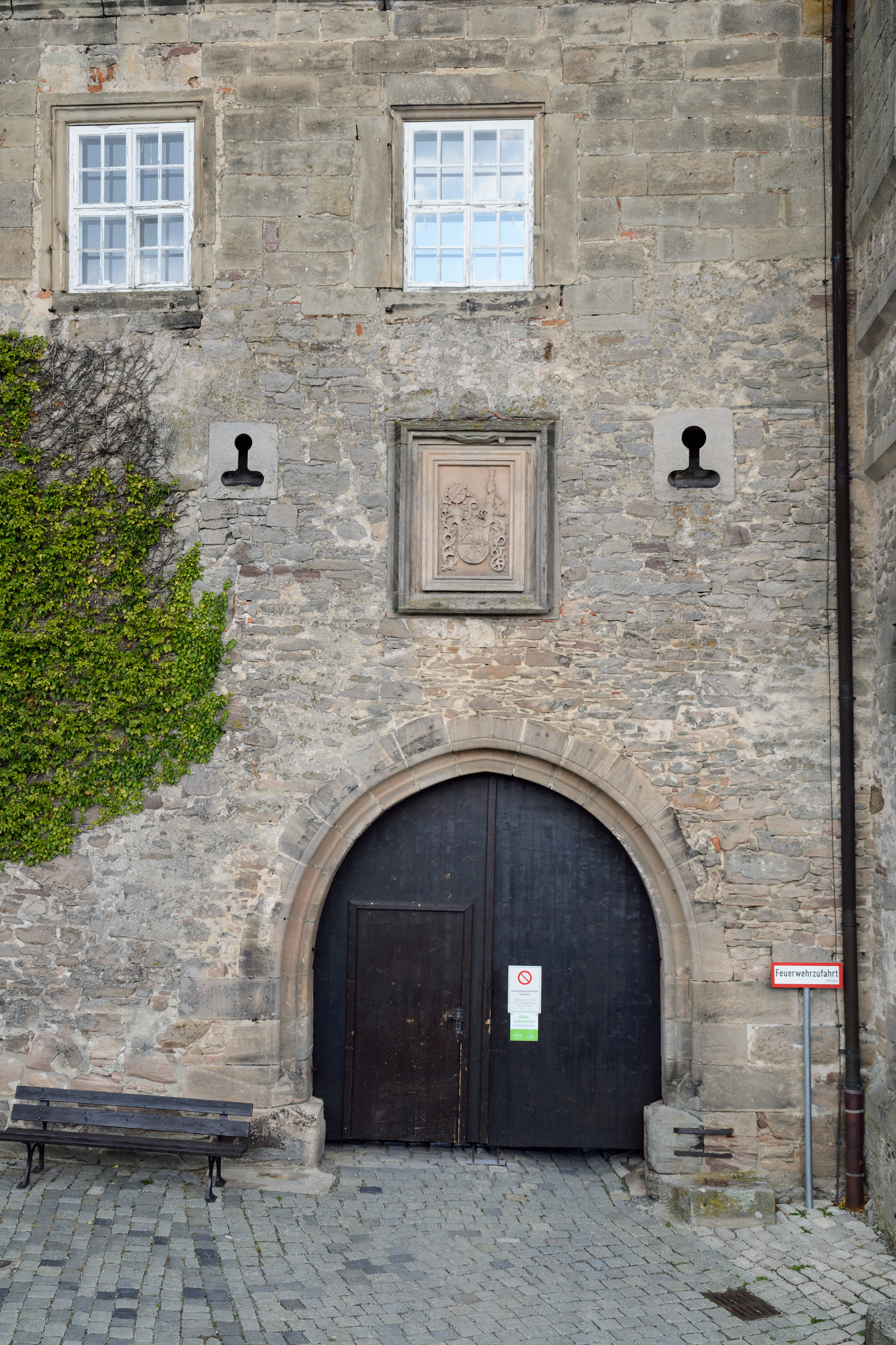 Das Zeughaustor im mittleren Bering der Festung Rosenberg in Kronach. Über dem Tor befindet sich das Wappen des Bamberger Fürstbischofs Philipp von Henneberg, der das Tor im 15. Jahrhundert anlegen ließ.